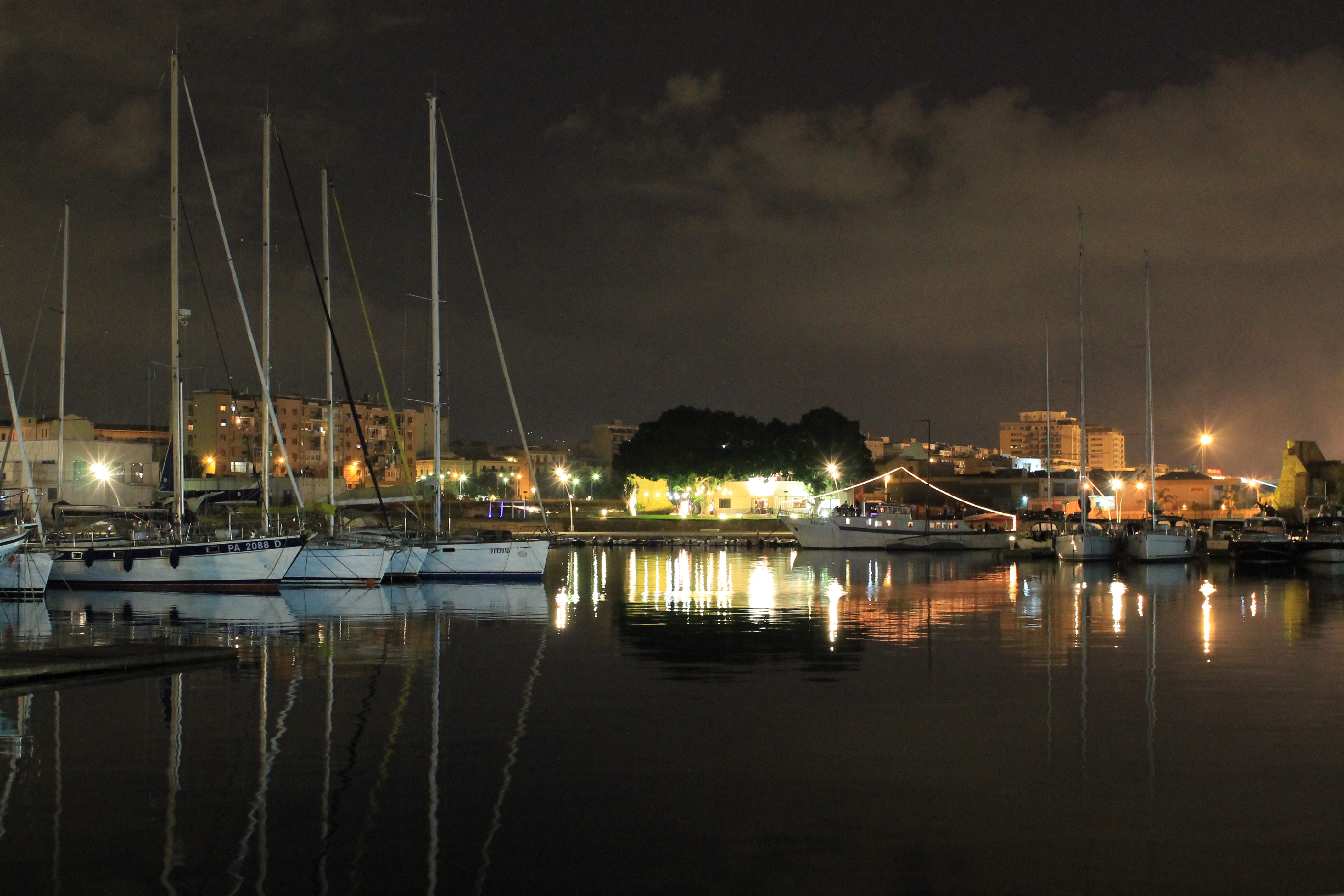 Palermo